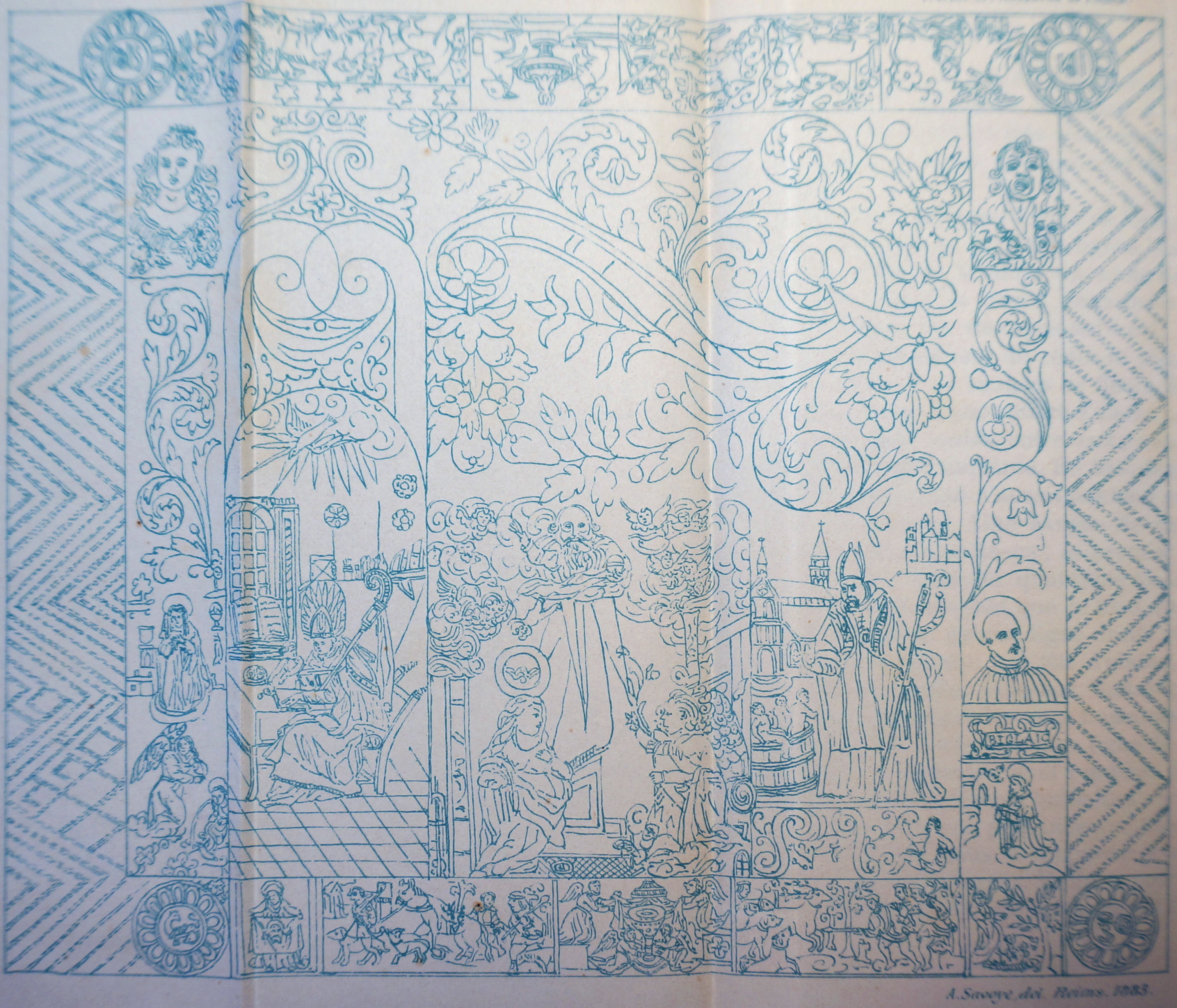 toiles brodée de l'ancien hotel dieu de reims.